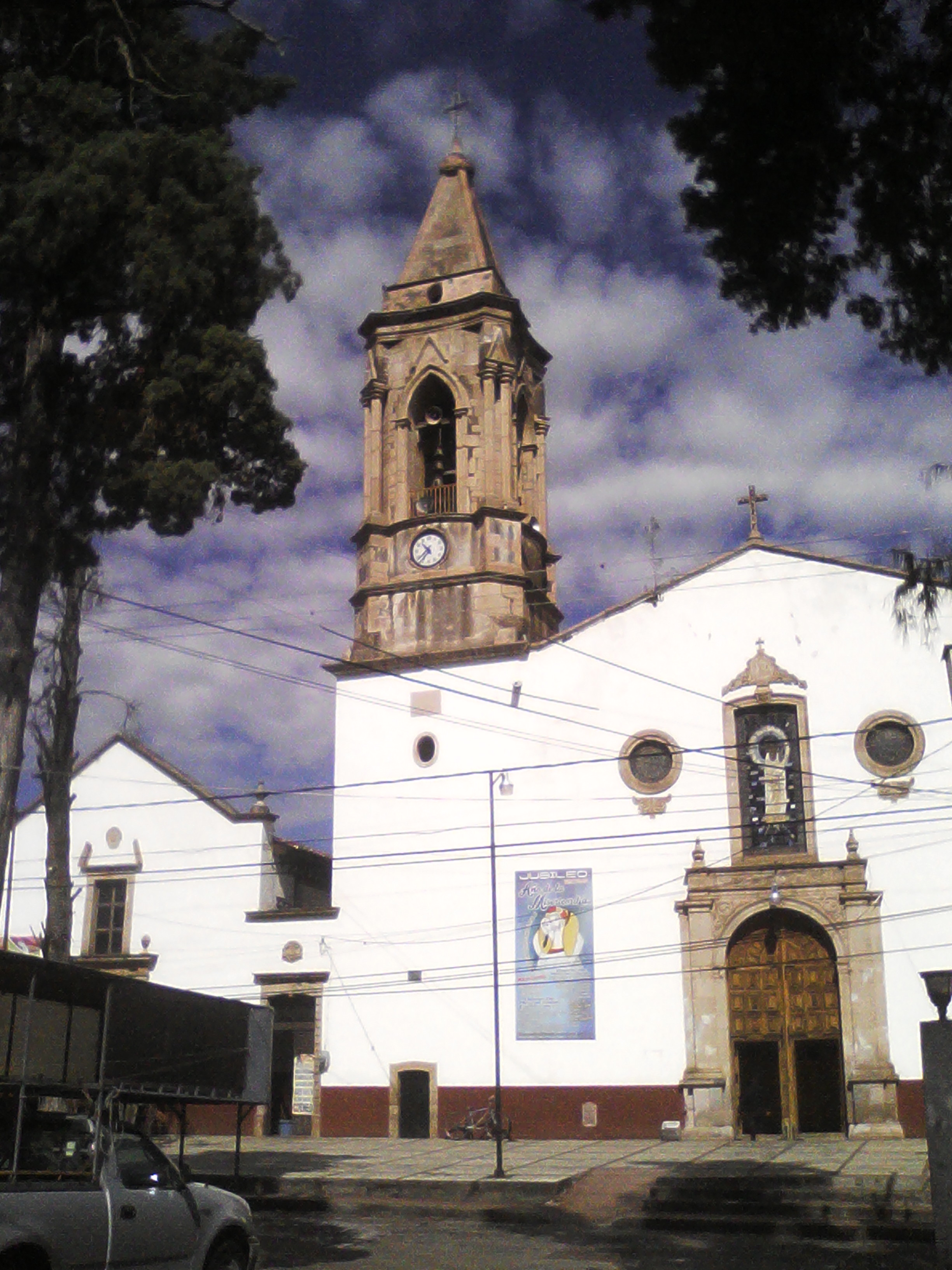 Parroquia de Nuestra Señora del Rosario de Coeneo